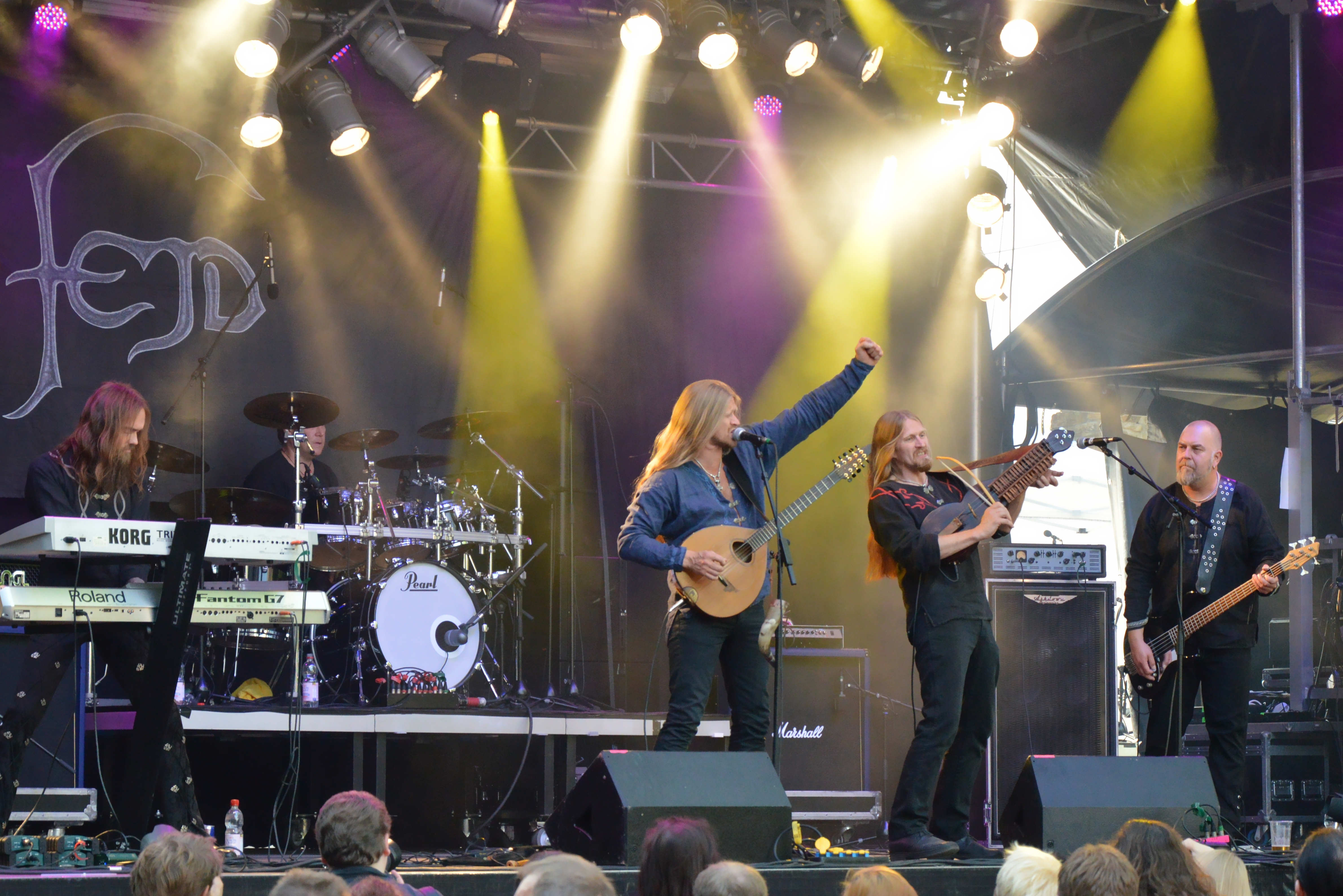 Fejd beim Burgfolk Festival 2013 auf Schloß Broich